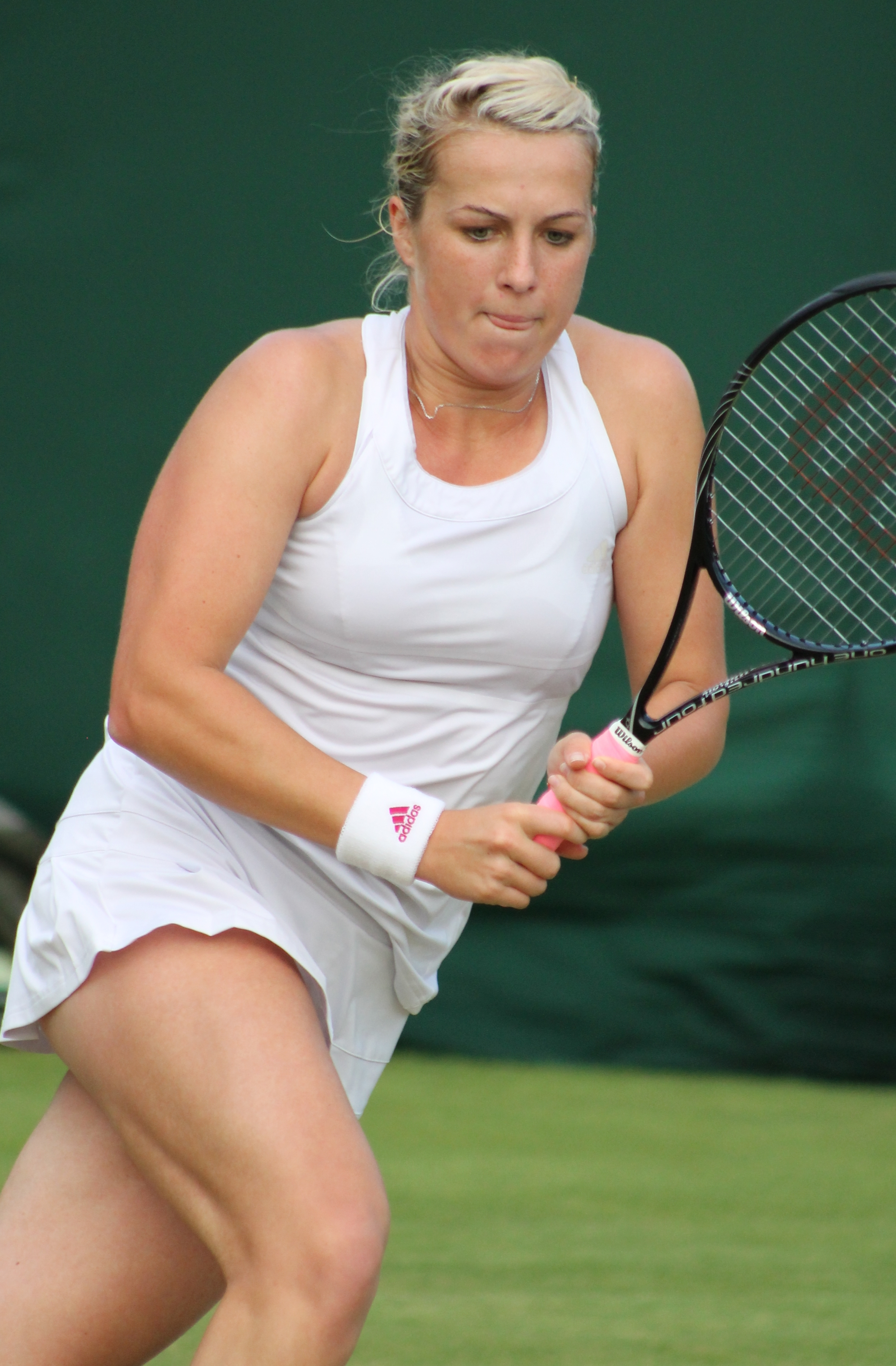 Pavlyuchenkova WM14 (13)